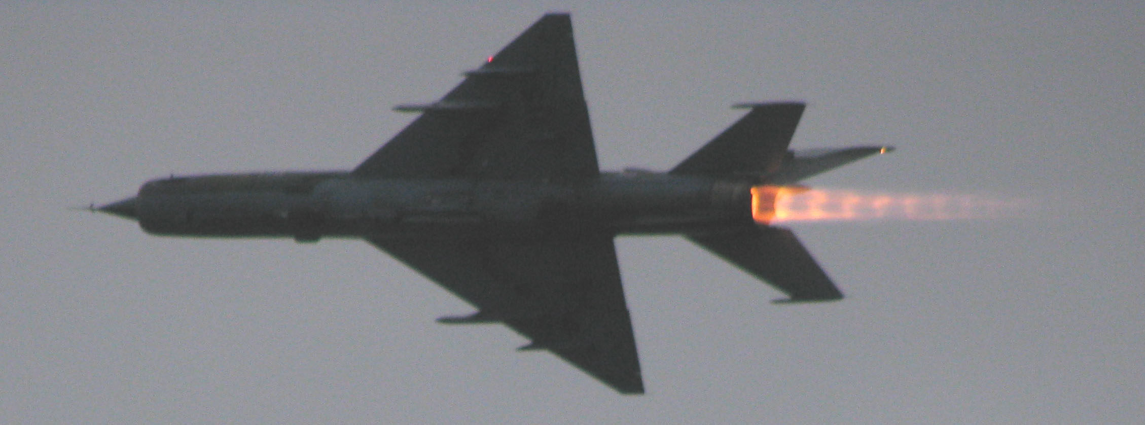 MiG 21 Lučko